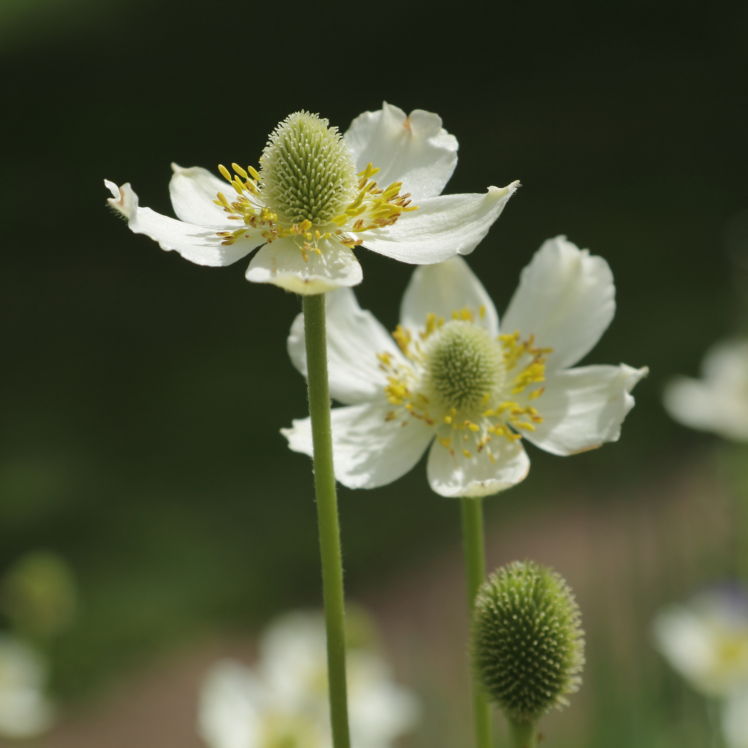 Anemone virginiana at Uppsala Botanic Gardens